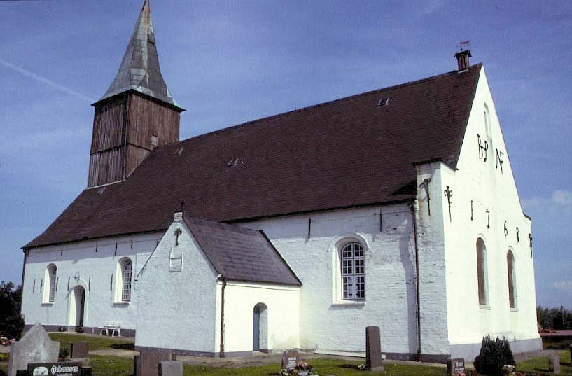 Emmelsbüll Kirke i Sydslesvig. Emmelsbüll kirke set fra sydøst